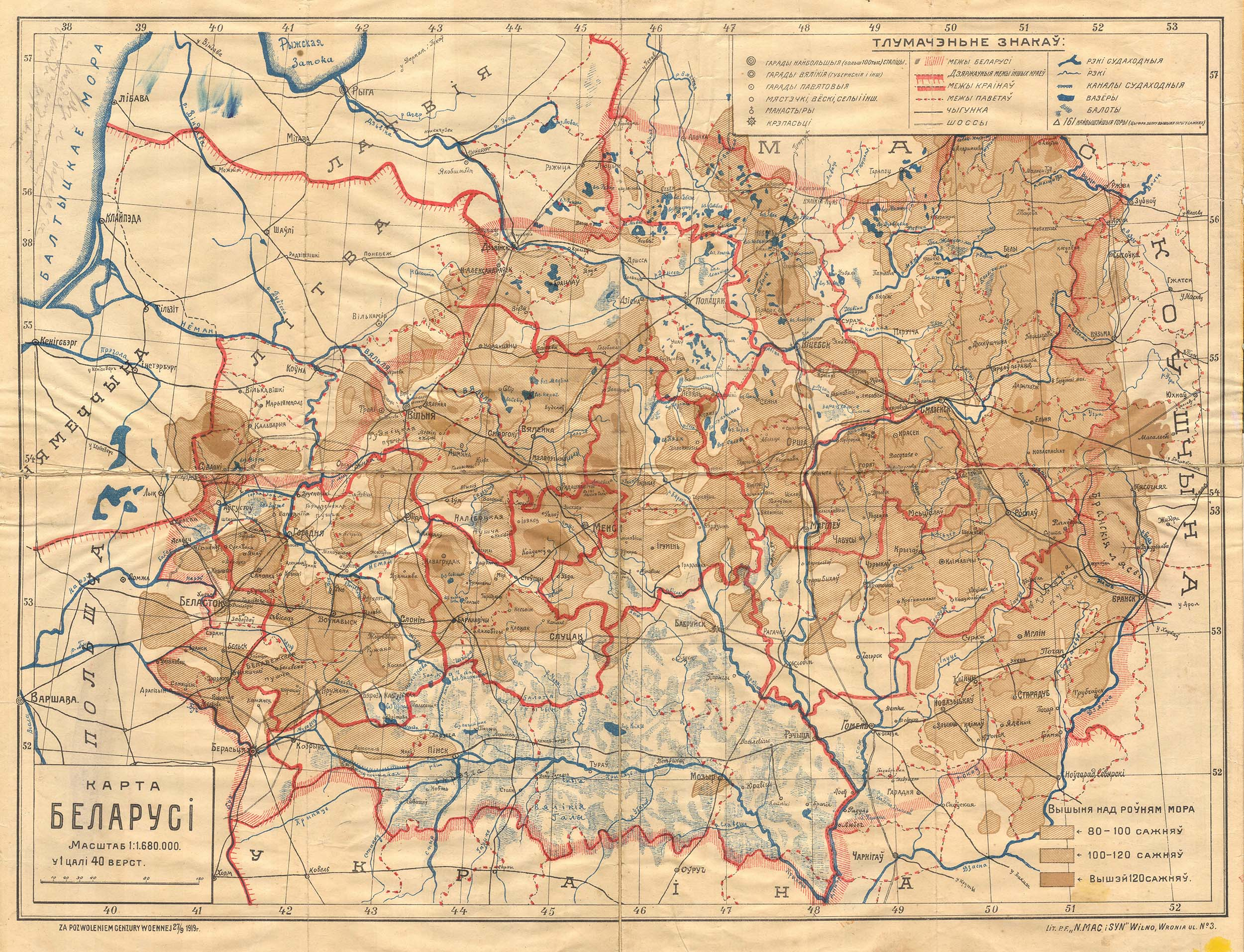 Беларуская (тарашкевіца): Беларусь (Biełaruś). Мапа